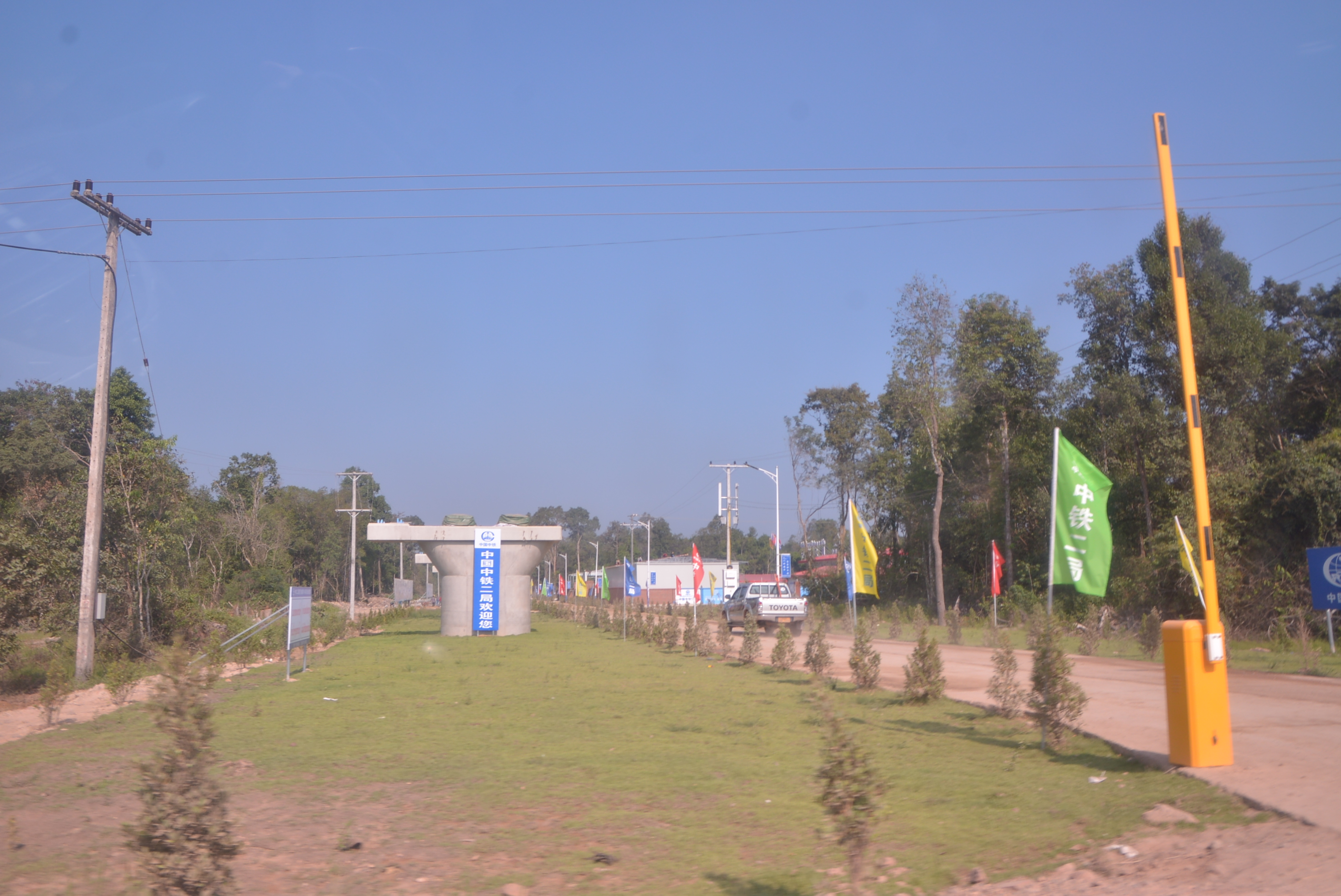 撮影場所:ヴィエンチャン郊外 撮影時期:2017年10月下旬